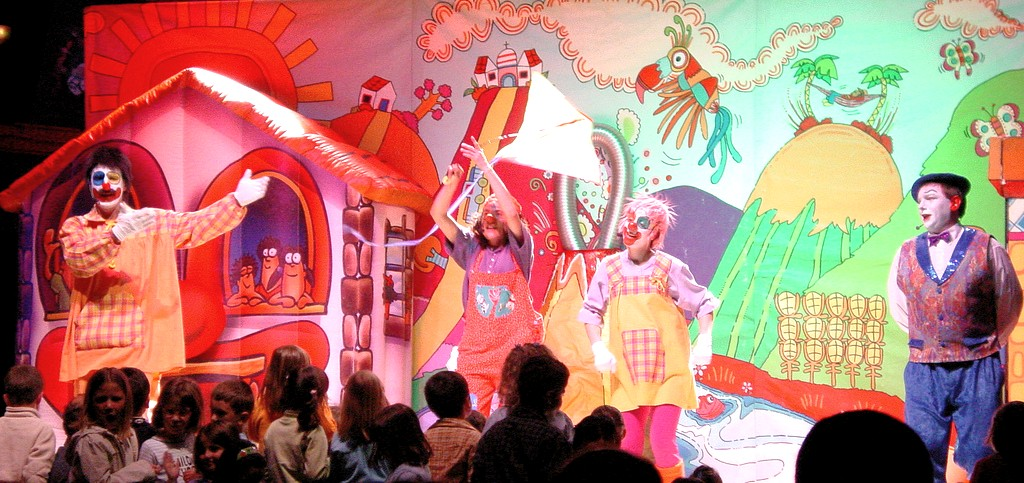 Takolo, Pirritx eta Porrotx